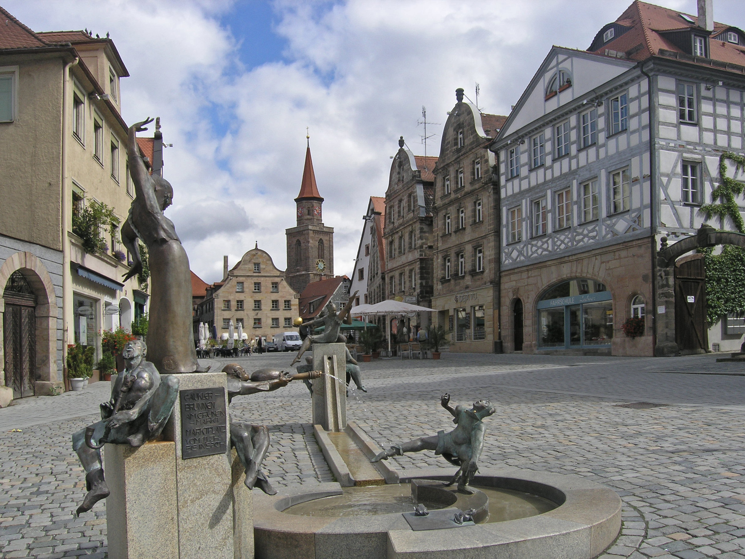 Grüner Markt in Fürth